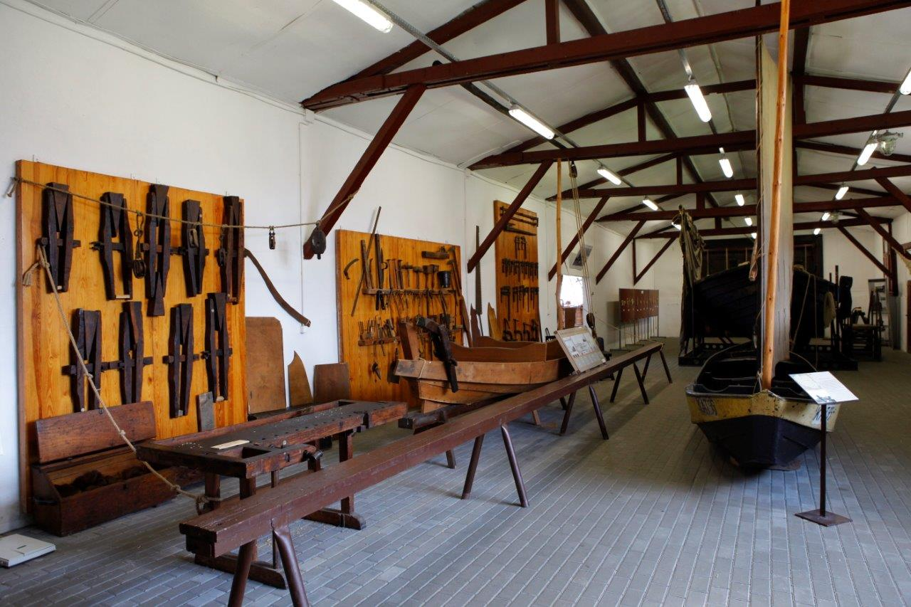 Fragment Wystawy stałej w Muzeum Zalewu Wiślanego